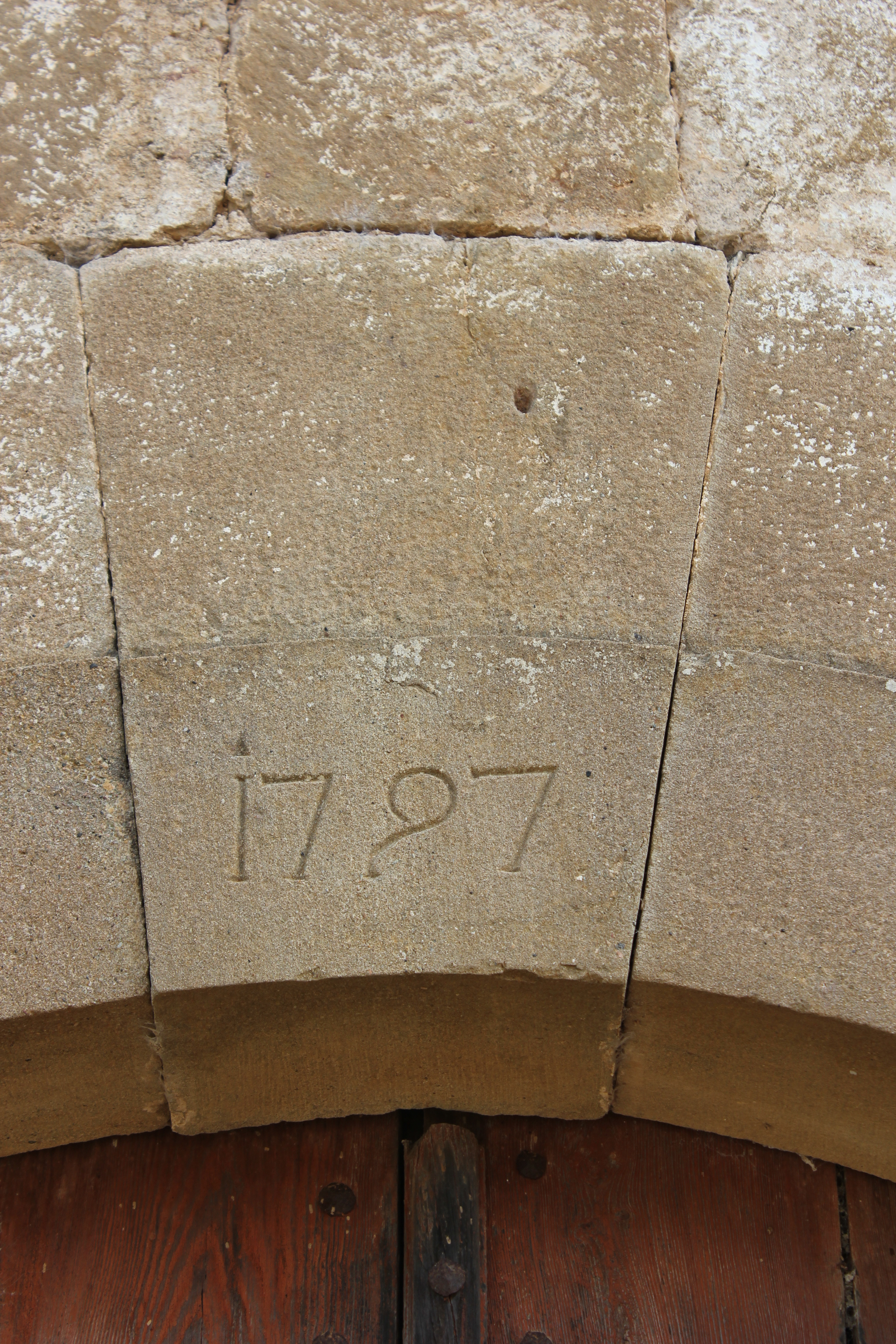 Llinda de la porta de l'església de Sant Sentís (Pinell del Solsonès), amb la inscripció 1787.